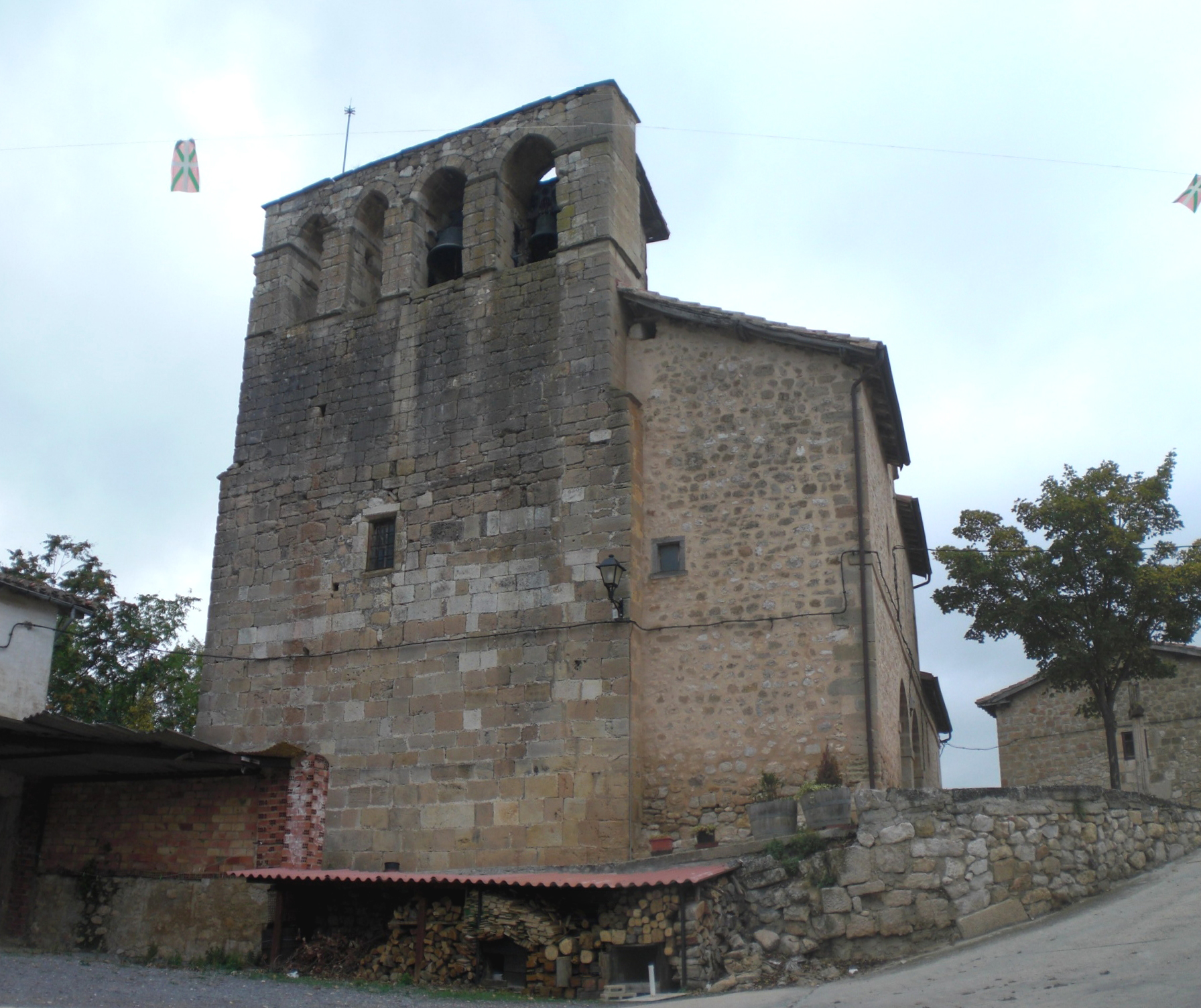 Santurdeko eliza.